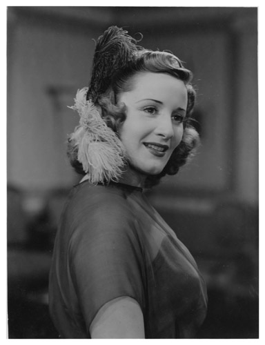 Amanda Ledesma en "Mañana me suicido" (1942).